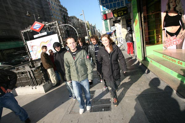 Los componentes de LODVG, en un encuentro digital de 20 Minutos, paseando por Callao.